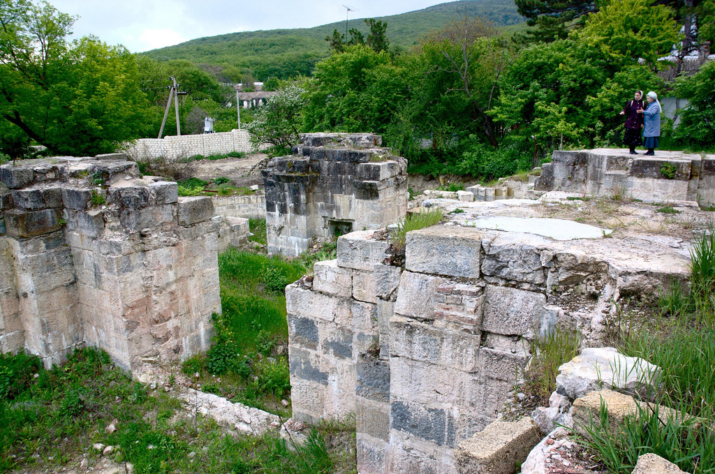 Топловский монастырь. Развалины Свято-Троицкого собора. Май 2008 года.